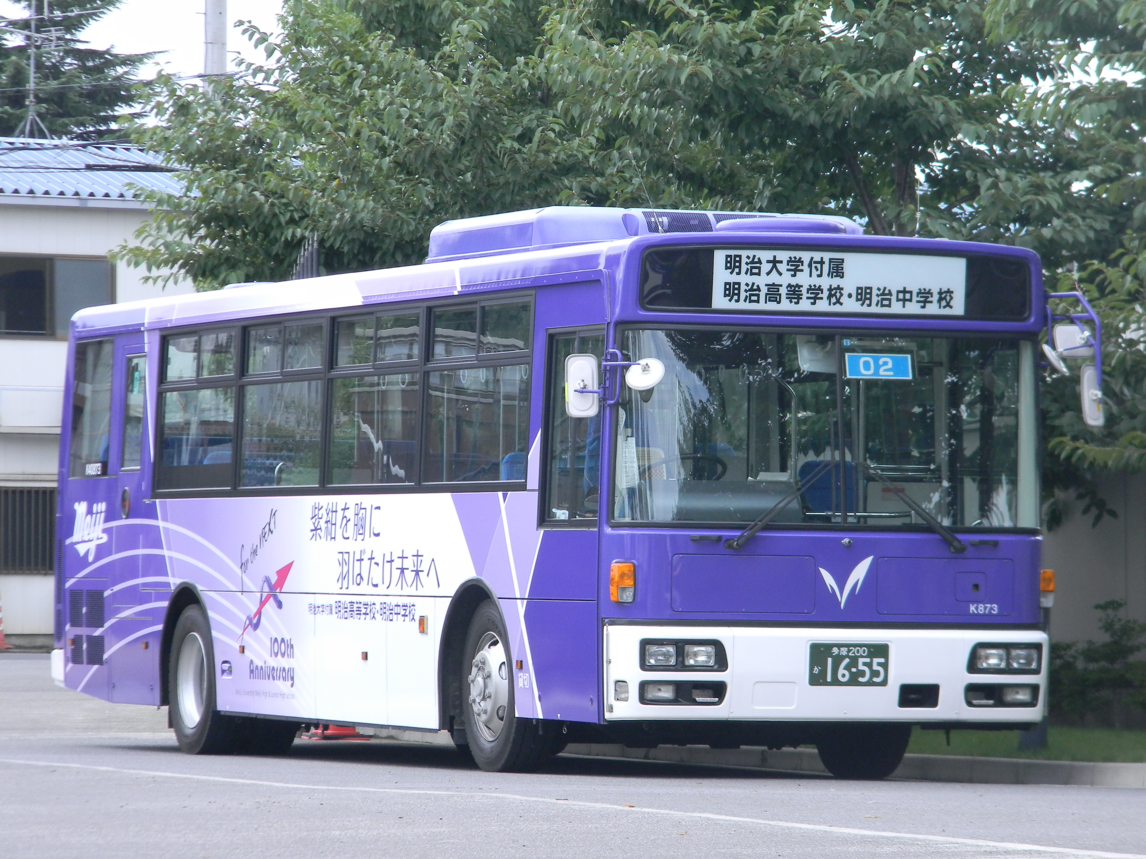 明治大学付属明治高等学校・中学校の開校100周年を記念し、ラッピングせれているスクールバス。2012/1/27現在、調布(東)、府中(中央)の各営業所に各1台ずつ配置されている。